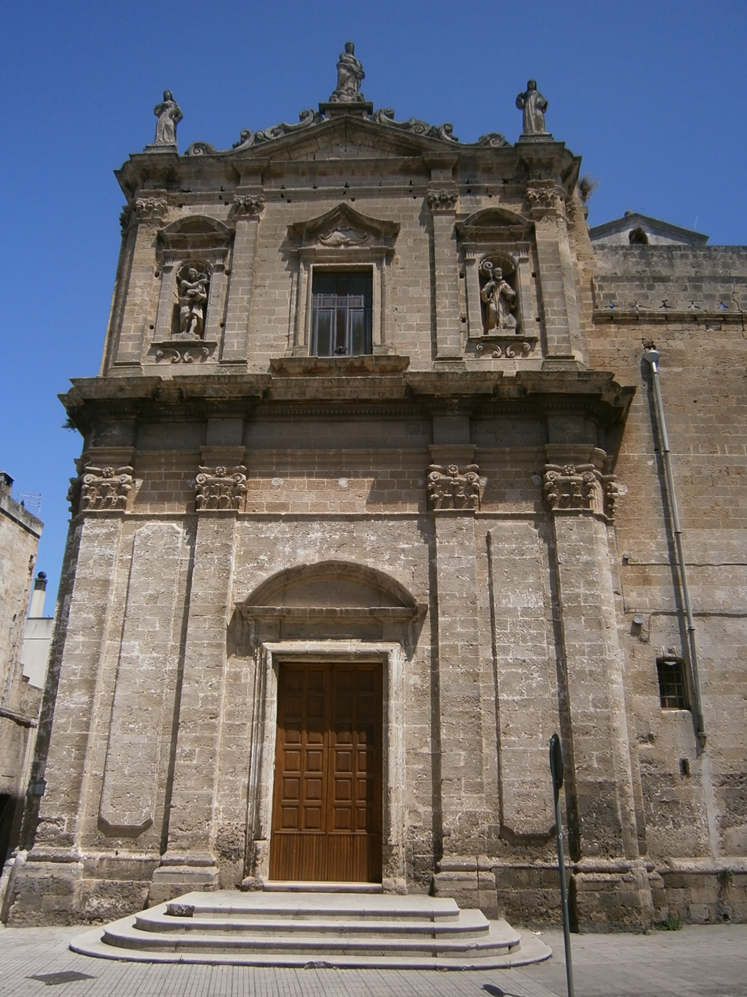 Manduria, la chiesa di San Benedetto.